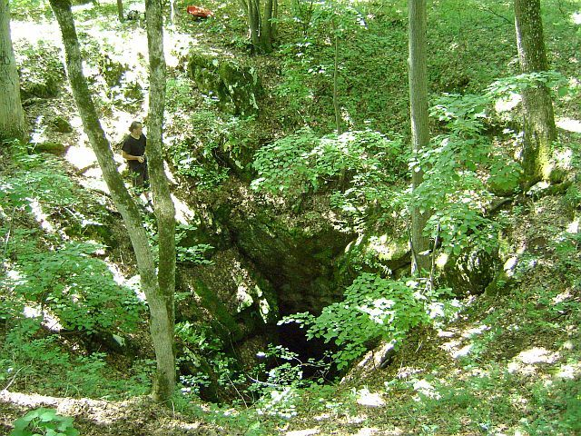 Geologicky, geomorfologicky, speleogeneticky i historicky významná priepasť Brázda (-181 m), bola prvý raz sčasti preskúmaná už v r. 1911. Nie je známe, kto vtedy do priepasti zostúpil a akým spôsobom. Práve v roku 1911 vyšiel prvý zoznam jaskýň z dnešného územia Slovenského krasu, ktorý zostavil maďarský geológ, geograf a speleológ Gábor Strömpl, nijaká súvislosť však nie je preukázaná. Jaskyňu preslávila tzv. "Expedícia do jaskynnej priepasti Barazdaláš" v roku 1953.